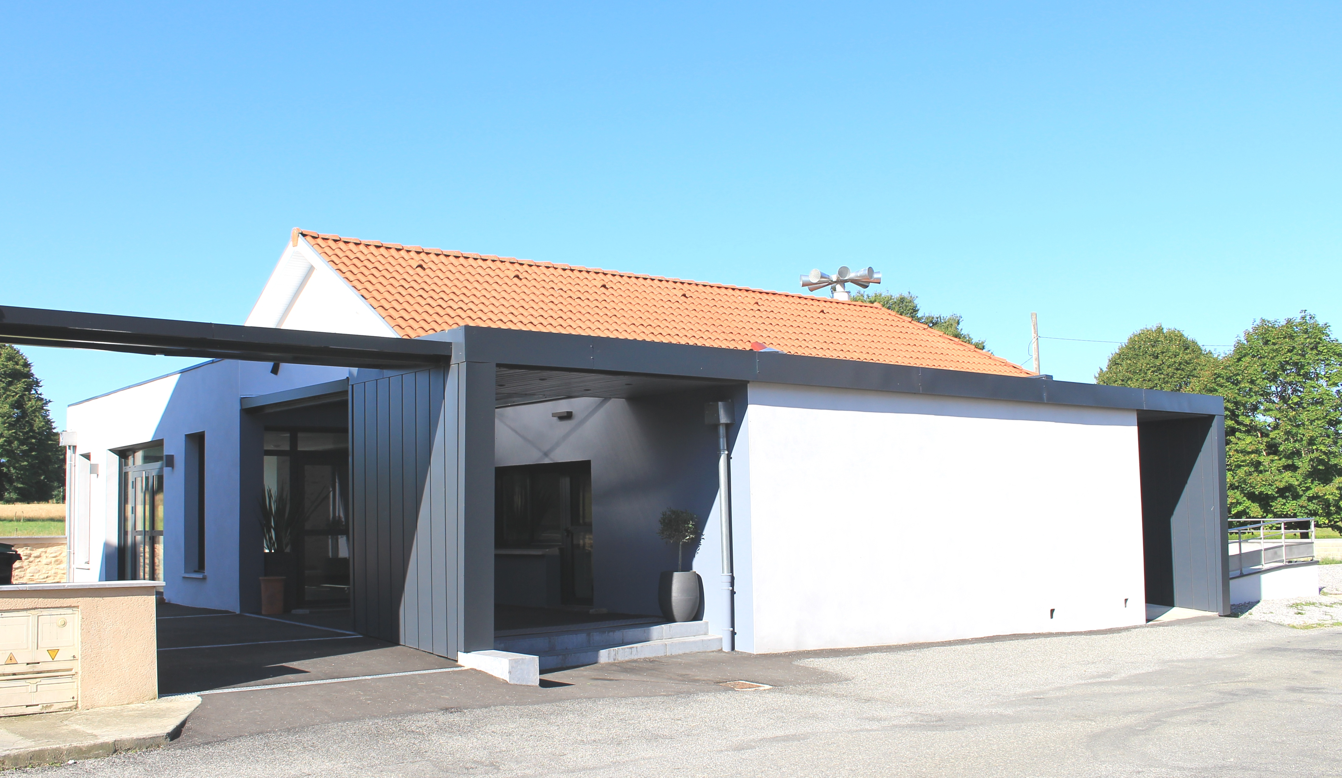 Salle des fêtes de Lagrange (Hautes-Pyrénées)